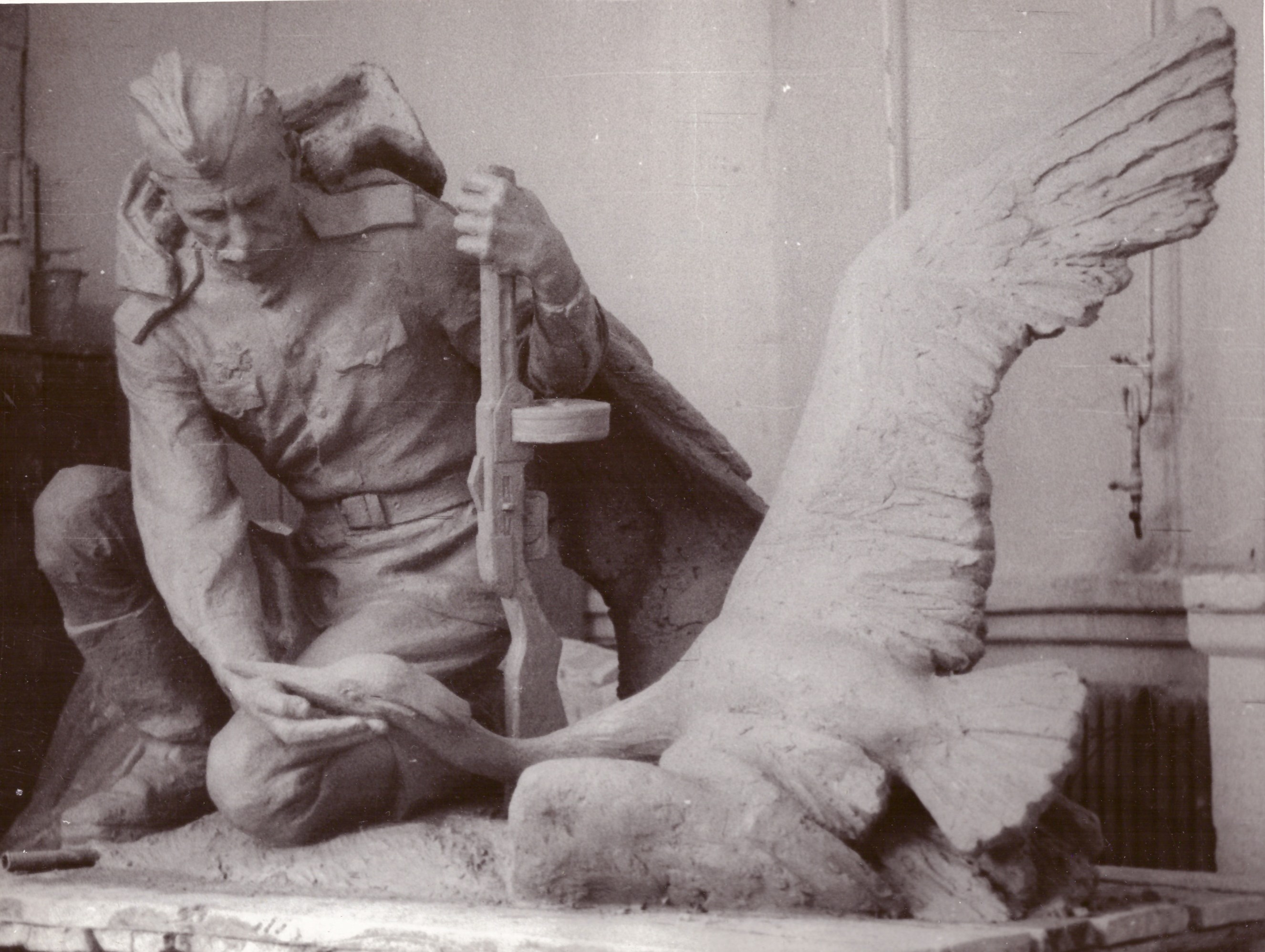 Пам’ятник загиблим воїнам-визволителям. С. Провалівка Любарський район Житомирська область. 1986. Скульптор Таранченко В.О., архітектор Бірюк П.М. Литий бетон.